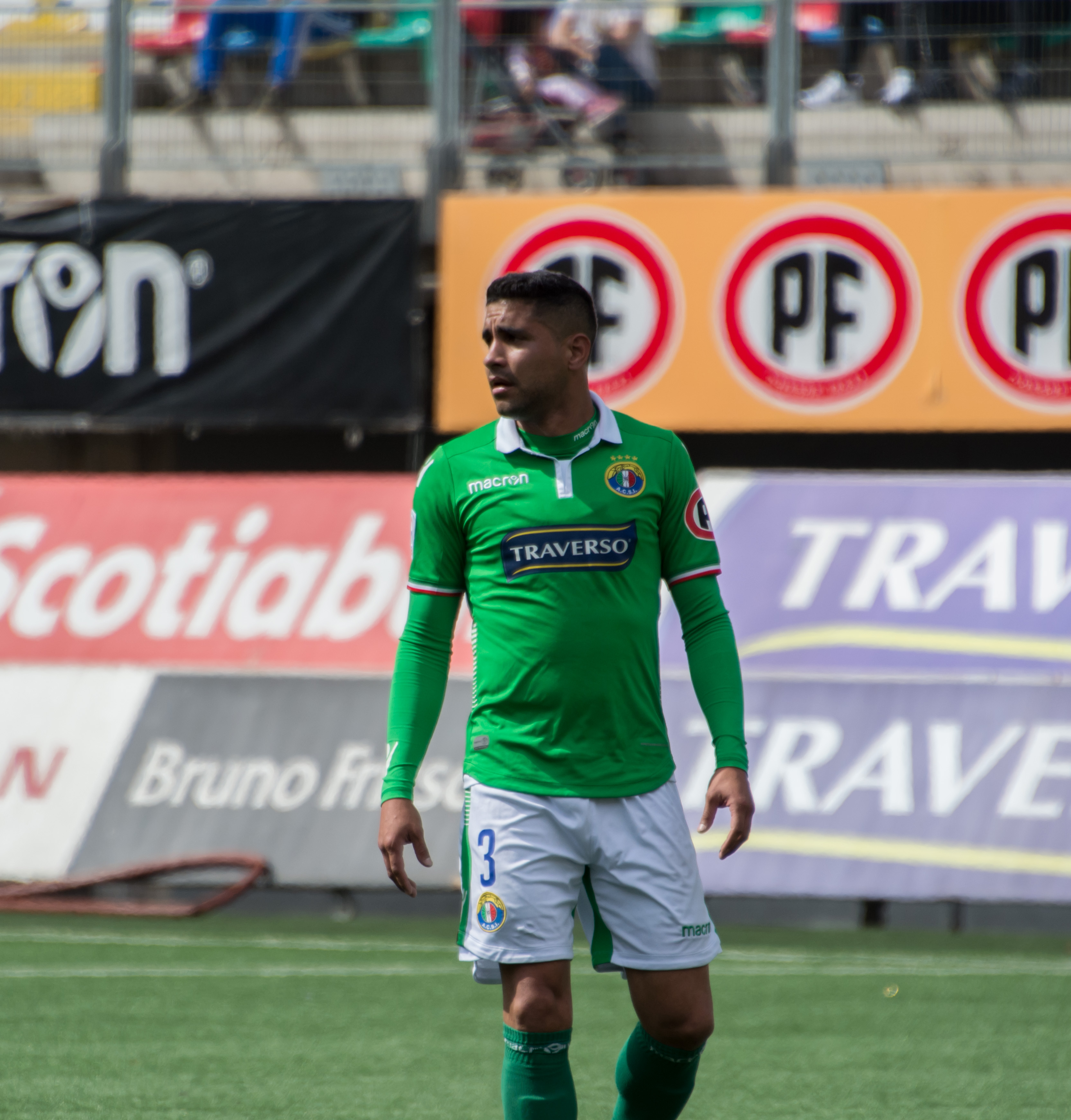 Manuel Fernández, Audax Italiano v Deportes Iquique, Estadio Bicentenario de La Florida, La Florida, Santiago, Chile